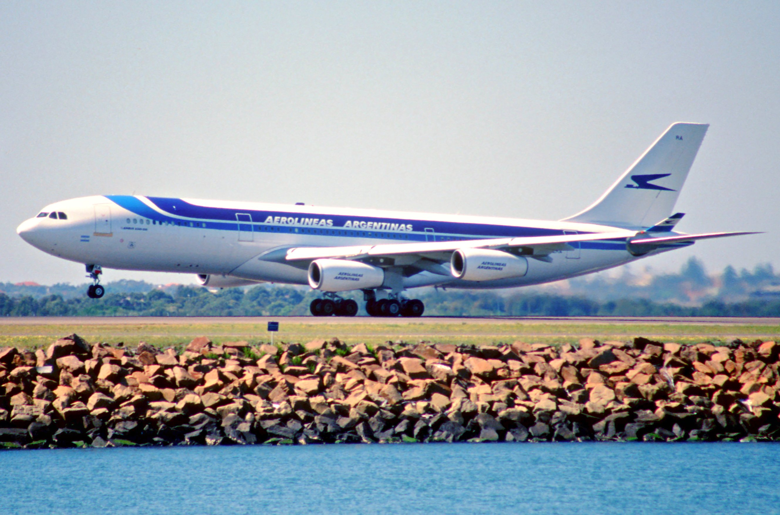 70bh - Aerolíneas Argentinas Airbus A340-211; LV-ZRA@SYD;04.09.1999